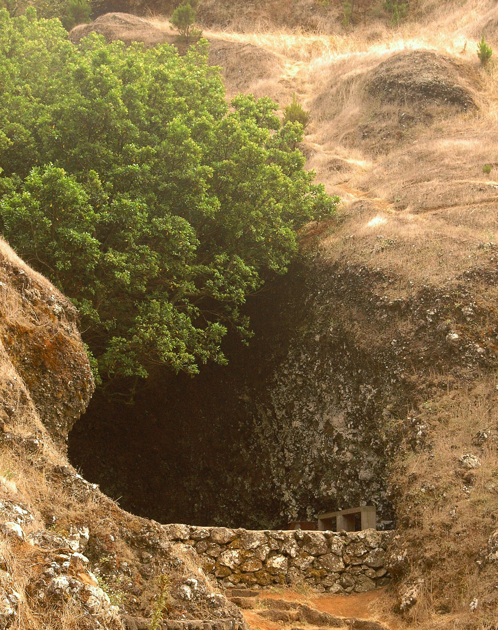 Árbol Garoé en isla de El Hierro (Canarias). Estaba considerado por los antiguos gomeros como un árbol sagrado.